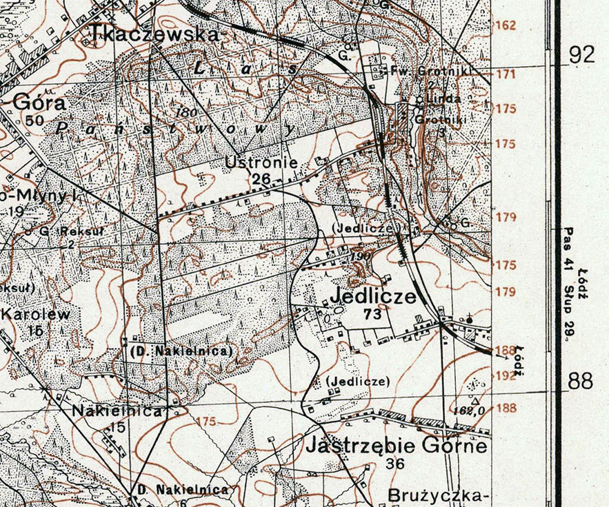 Fragment mapy okolic Ozorkowa z 1930 roku